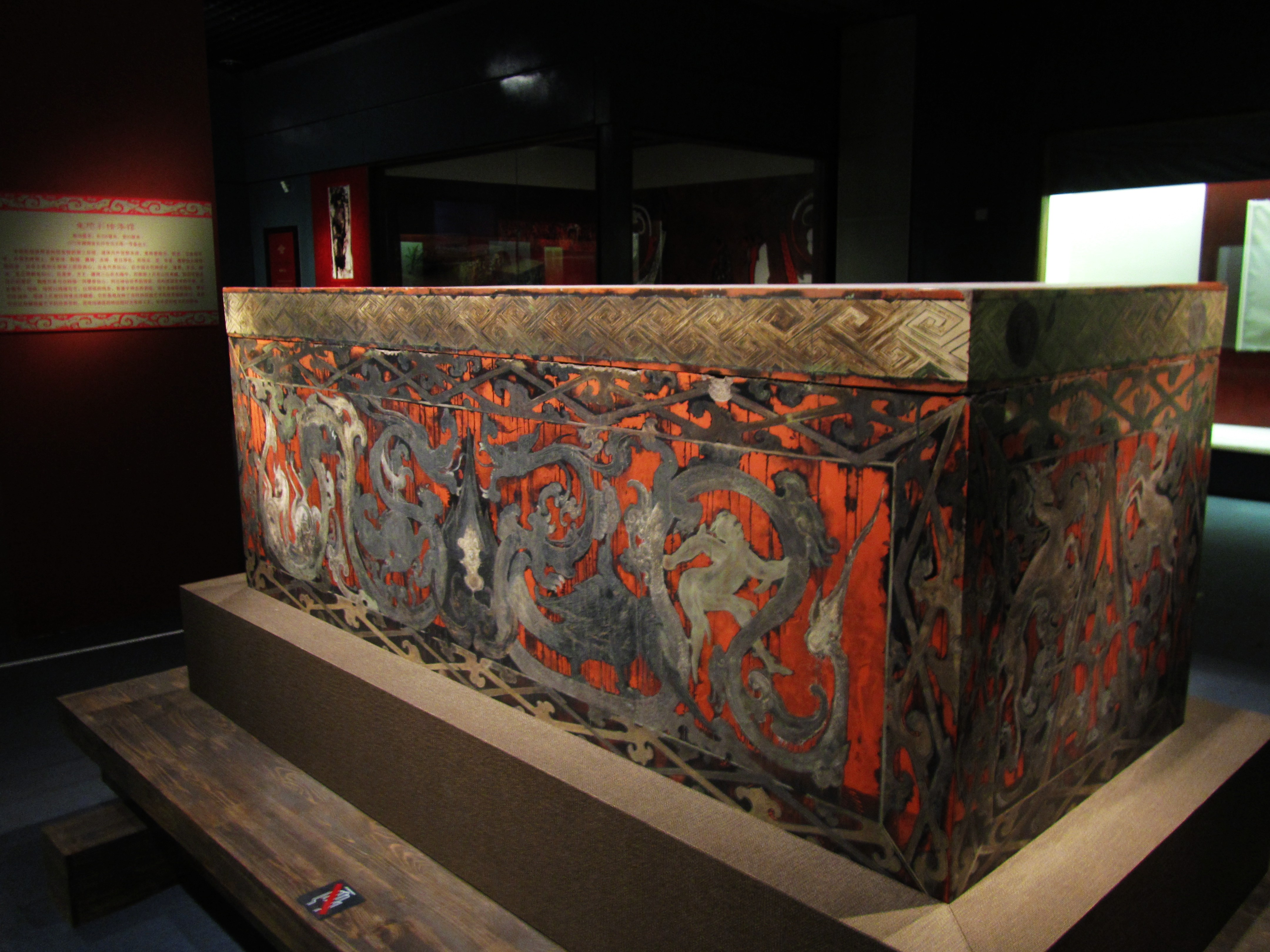 朱地彩绘漆棺，1972年湖南省长沙市马王堆一号墓出土，高88厘米，长230厘米，宽93厘米，为四层套棺的第三层棺。